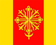 Flag of Kriukai